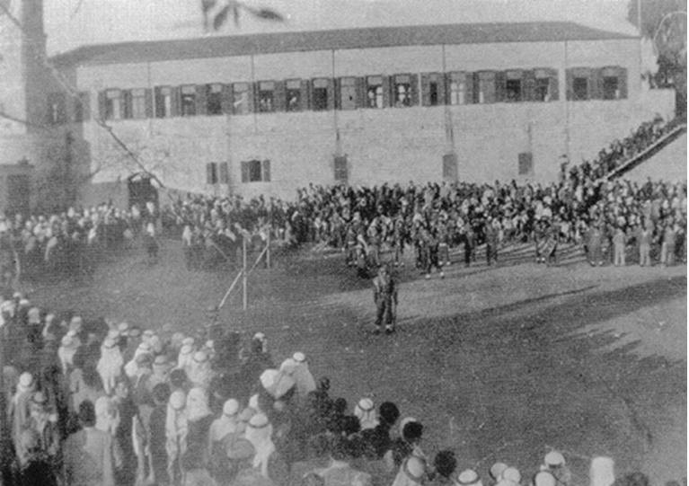 הטקס הרשמי בו העבירו הבריטים לידי הערבים את המבנים האסטרטגיים בצפת, 1948